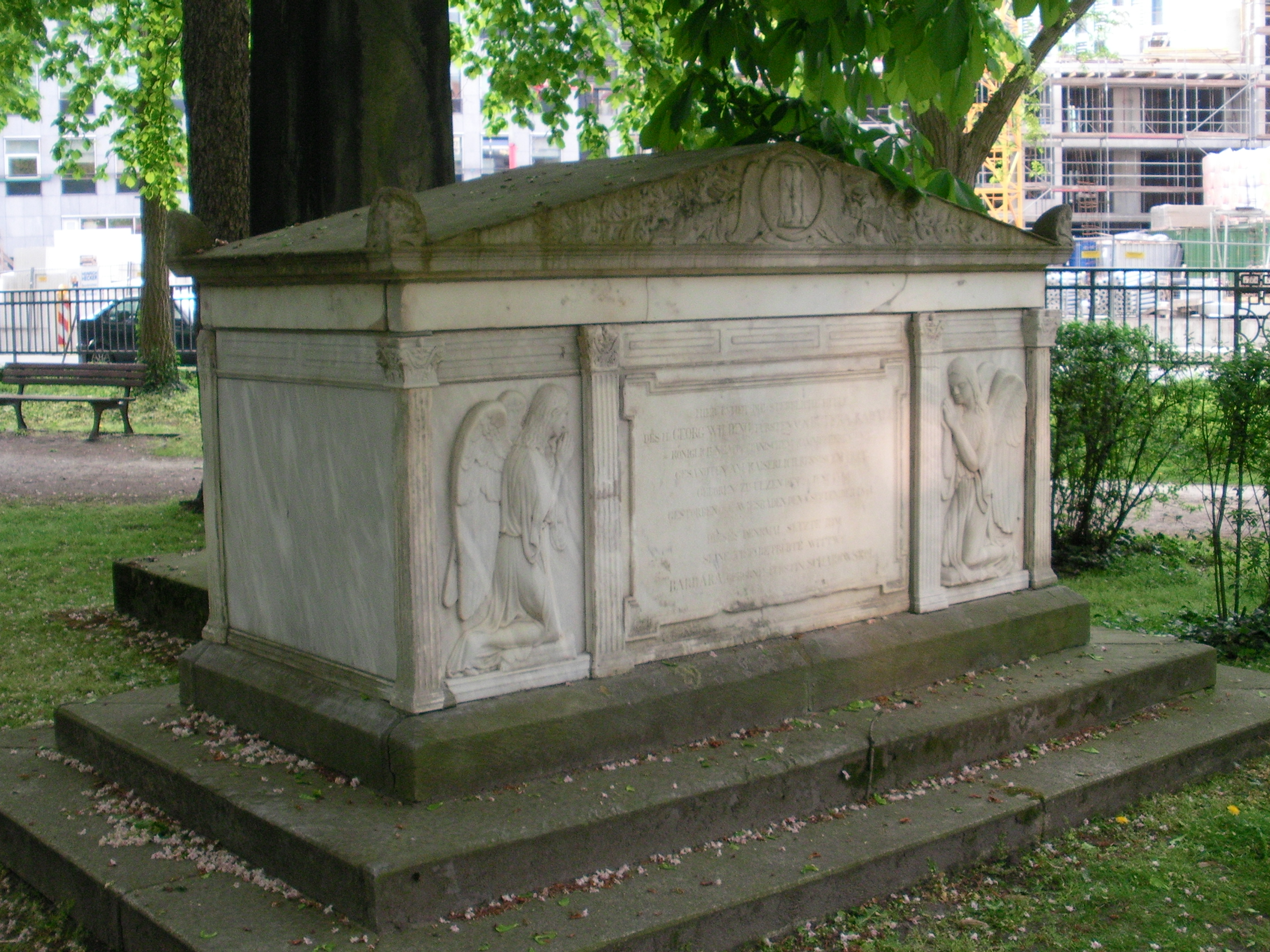 Grabmal von Georg Wilding Fürst von Butera Radali (1790–1841) auf dem Gartenfriedhof in Hannover